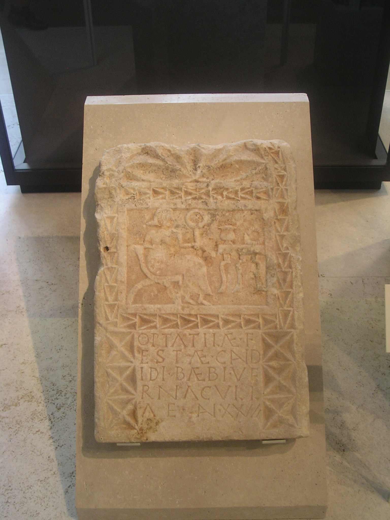 Inscripción funeraria romana depositada en el Museo Arqueológico Nacional en Madrid (España), procedente de Lara de los Infantes (Burgos, España), correspondiente con EE VIII-8-02, 155 = ERLara 159: Optatilae F/estae Cand/idi Baebi ve/rnacull/ae an(norum) XXVII